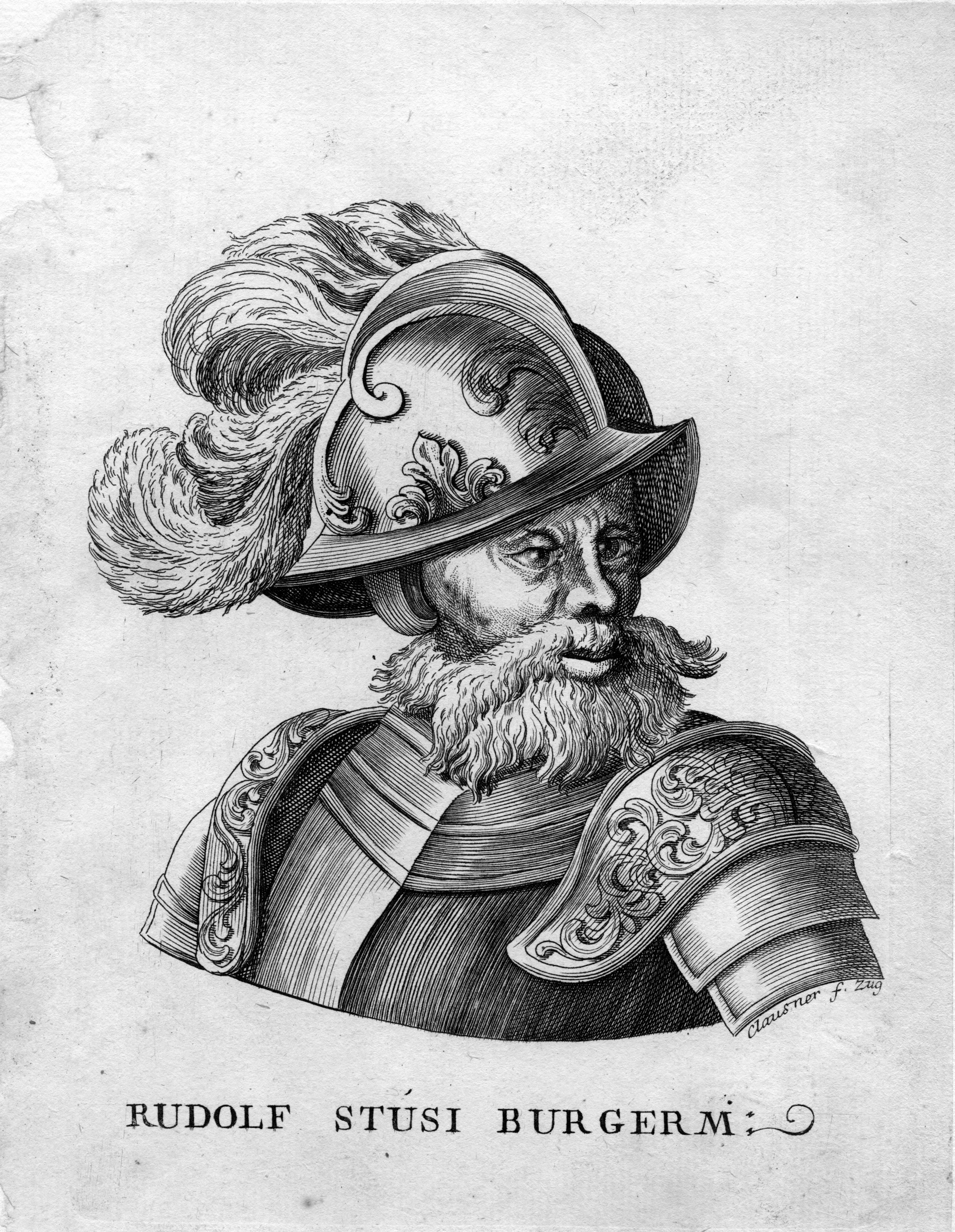 portrait gravé